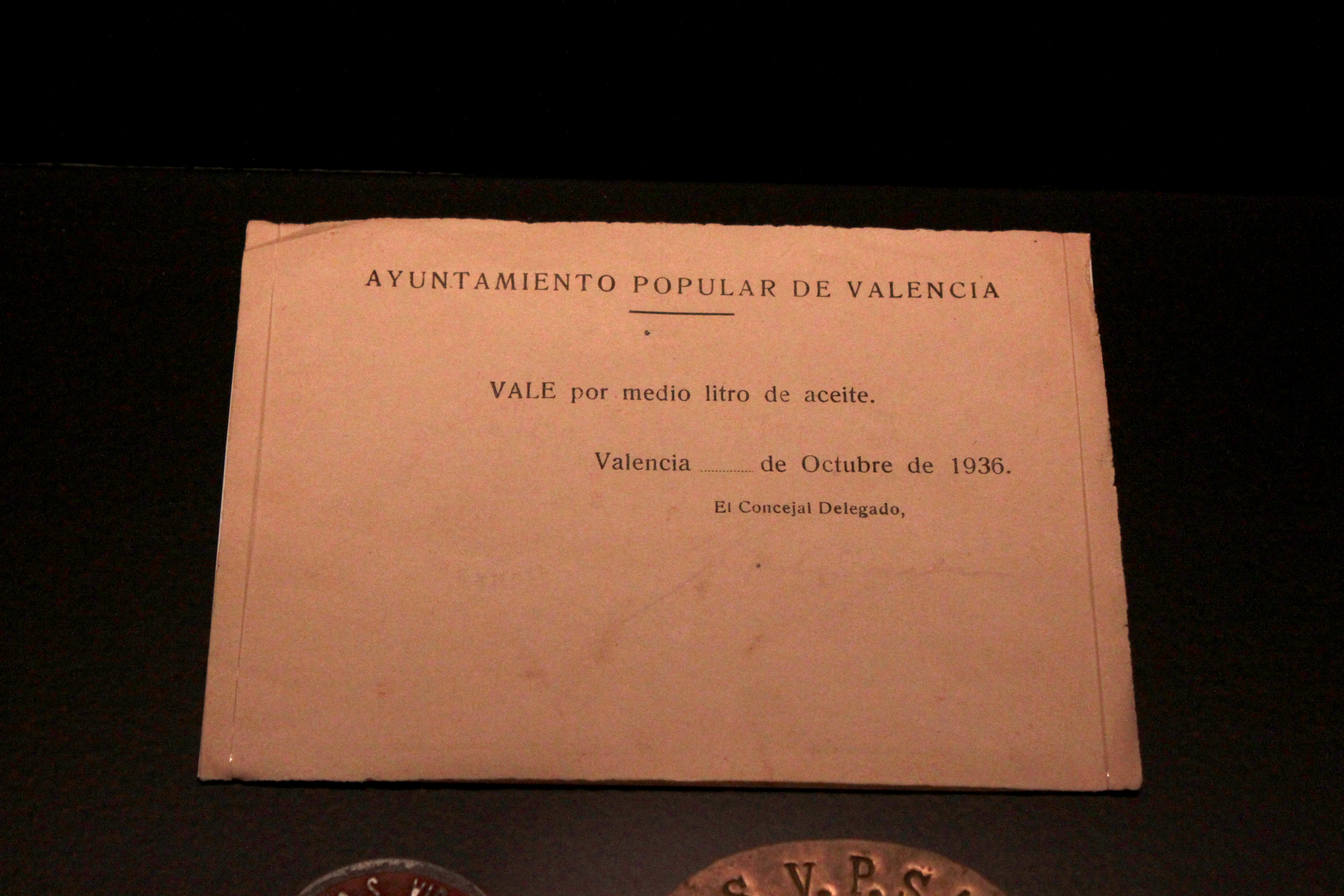 Vale emitido por el Ayuntamiento Popular de Valencia durante la Guerra civil española, año 1936, correspondiente a medio litro de aceite. Exposición Historia del Dinero. Depositada en el Museo de Prehistoria de Valencia, Comunidad valenciana, España.